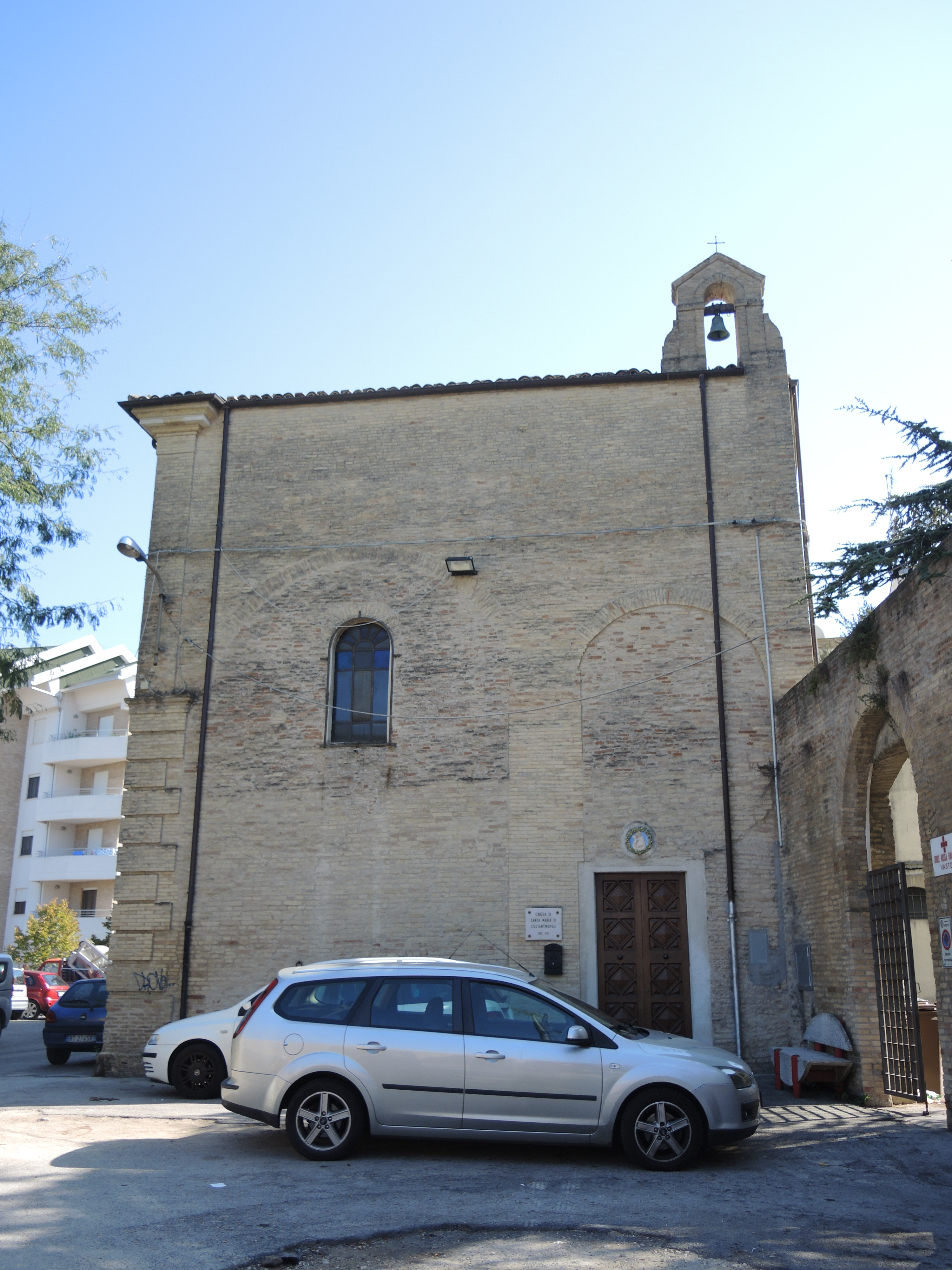 Palazzo Aragona This is a photo of a monument which is part of cultural heritage of Italy.